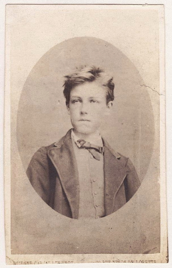 Repoduction photographique vers 1912 de l'original photo-carte de visite par Étienne Carjat (carton 6,3 X 10,5 cm) 1871/72 - Origine : succession Paul Claudel, bibliothèque nationale.